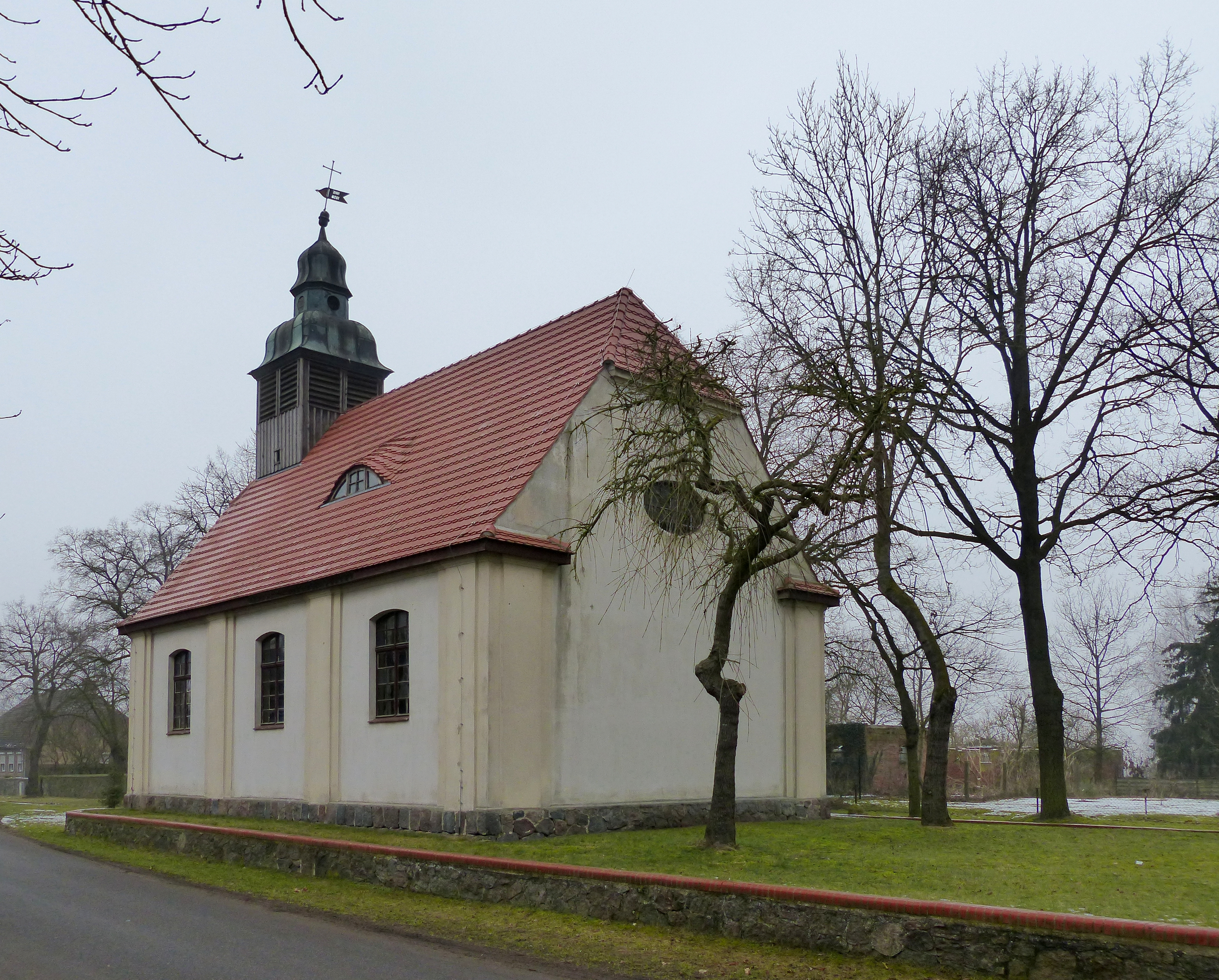 Blumenthal bei Ferdinandshof, Evangelische Kirche, Ansicht von Südosten